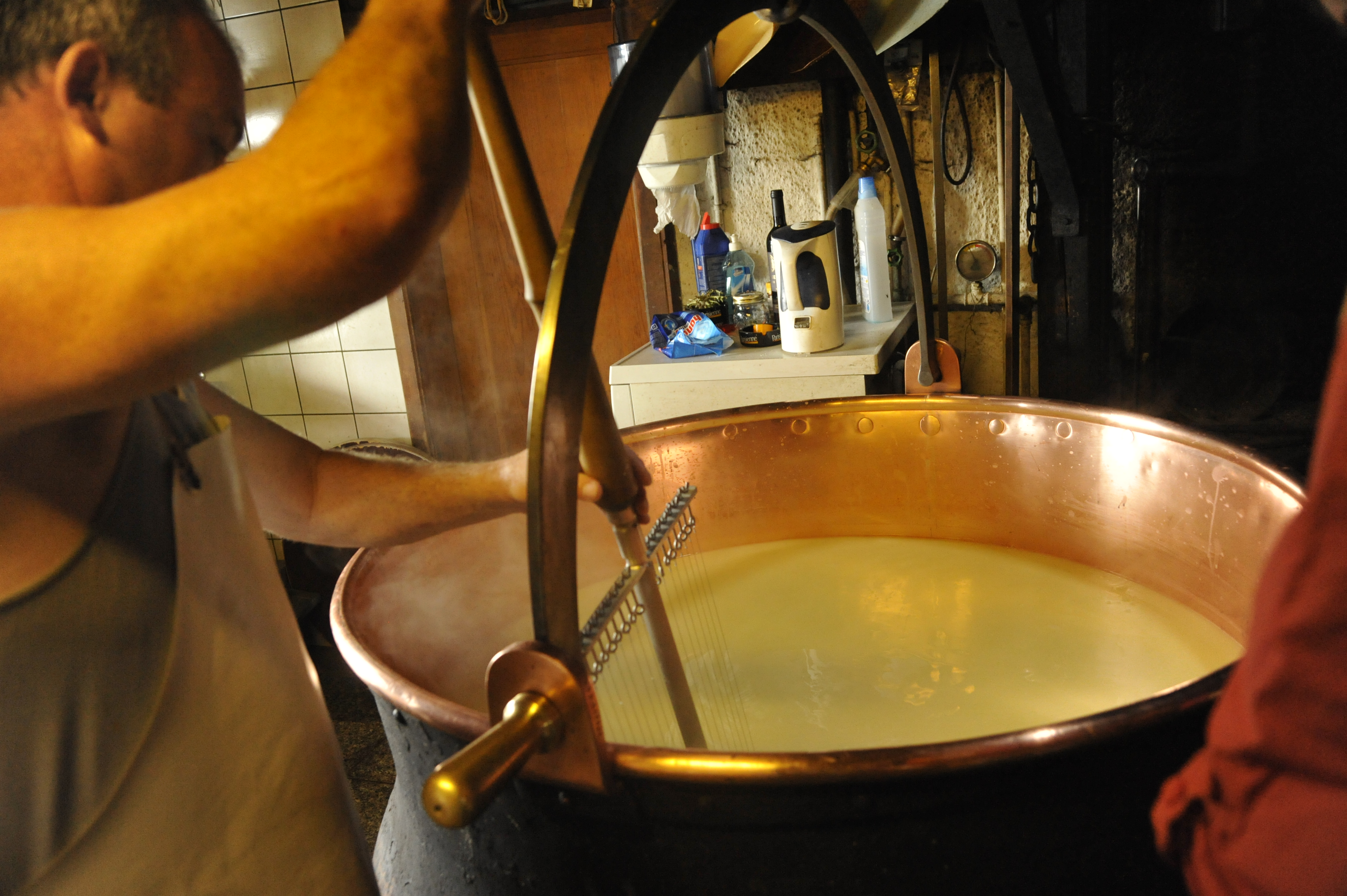 Coupage du lait caillé avec le tranche caillé pour le réduire en petit grains